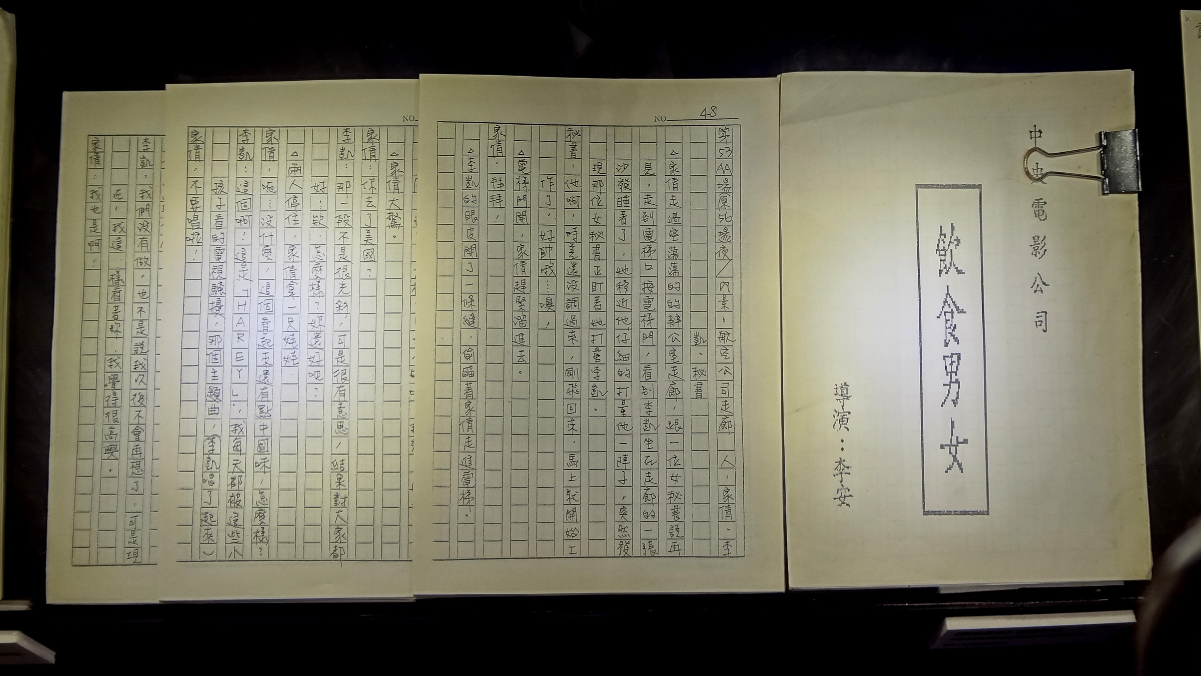 金馬50風華展展示的中央電影公司電影《飲食男女》劇本。